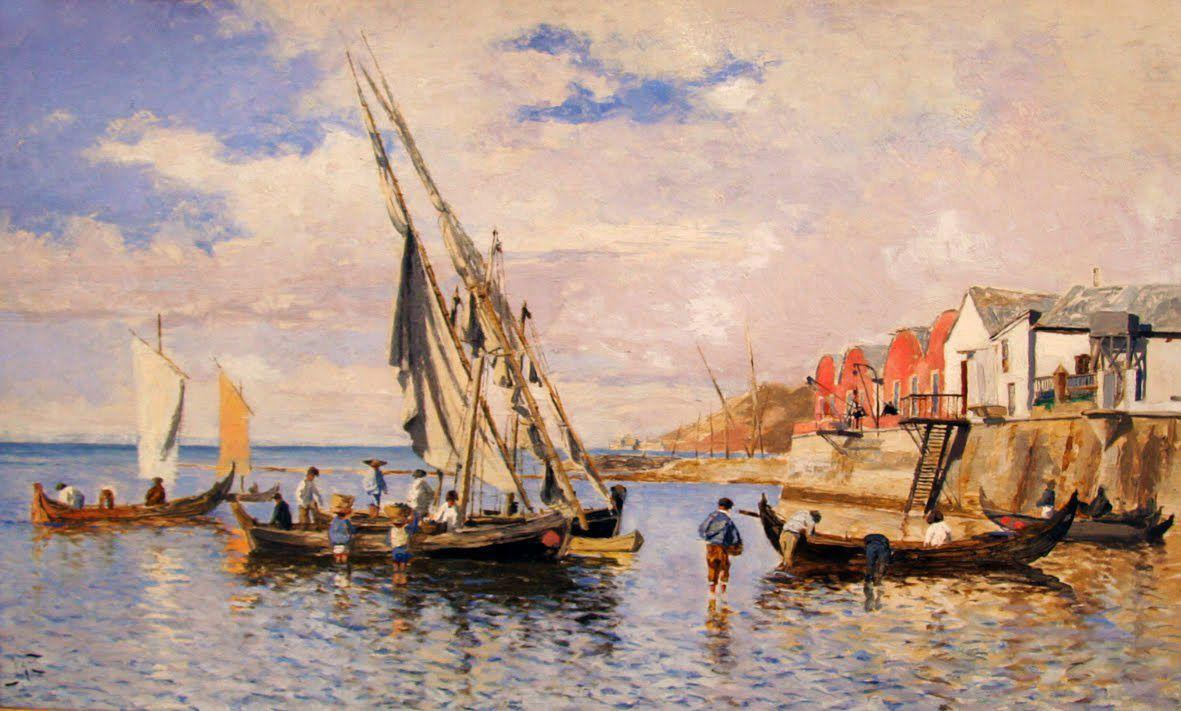 Óleo sobre tela colado em cartão